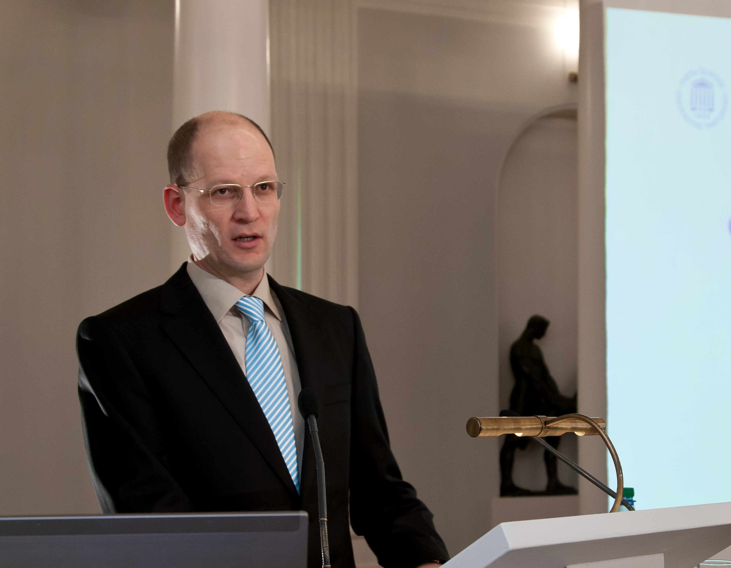 22. märtsil 2012 pidas Tartu Ülikooli soome-ugri keelte professor Gerson Klumpp TÜ aulas inauguratsiooniloengu teemal "Ideofoonilised väljendusvahendid".